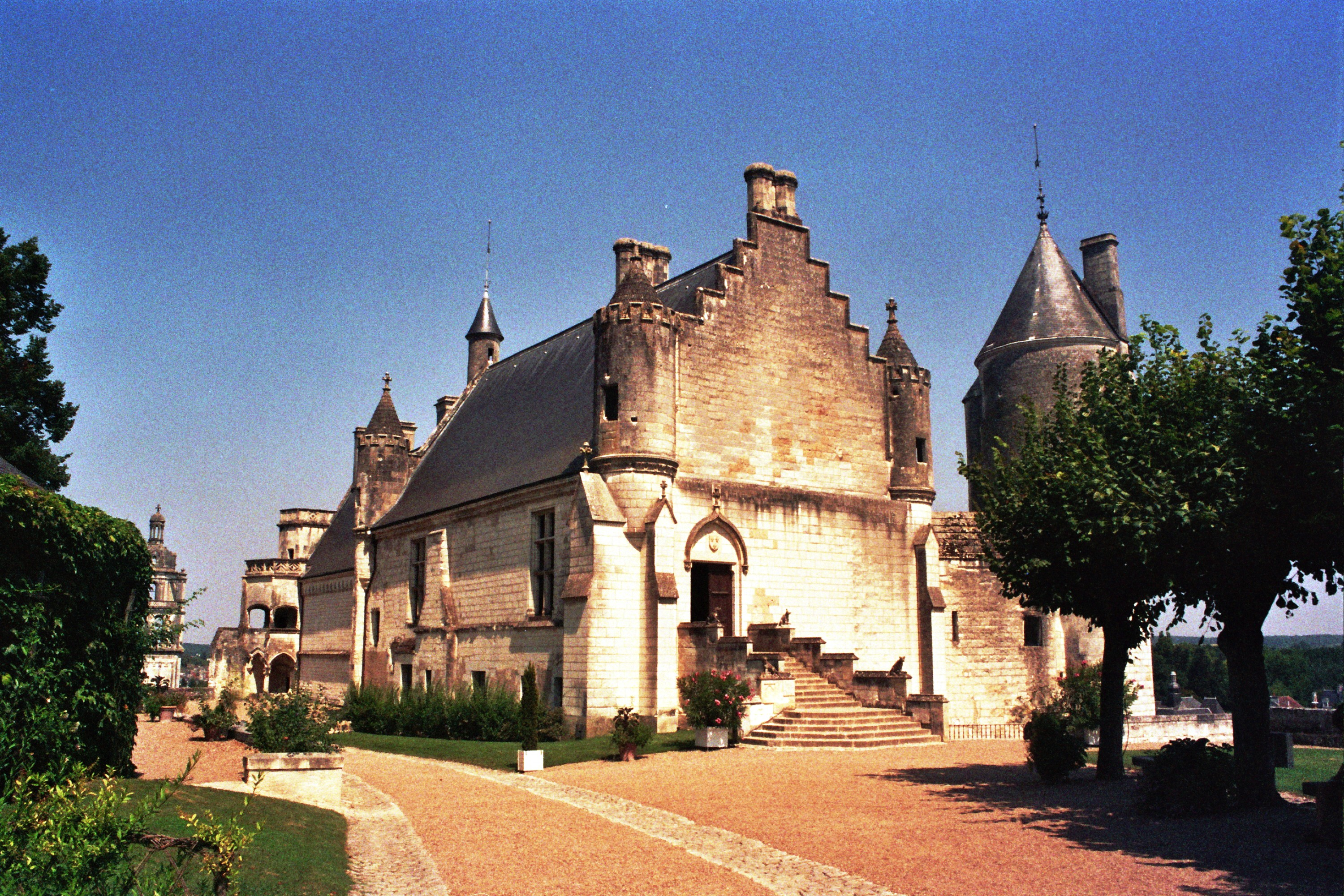 Château de Loches (ClasséClasséClasséInscrit) .